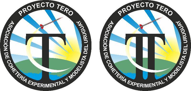 Logotipo de cohetes experimentales Tero I y Tero II